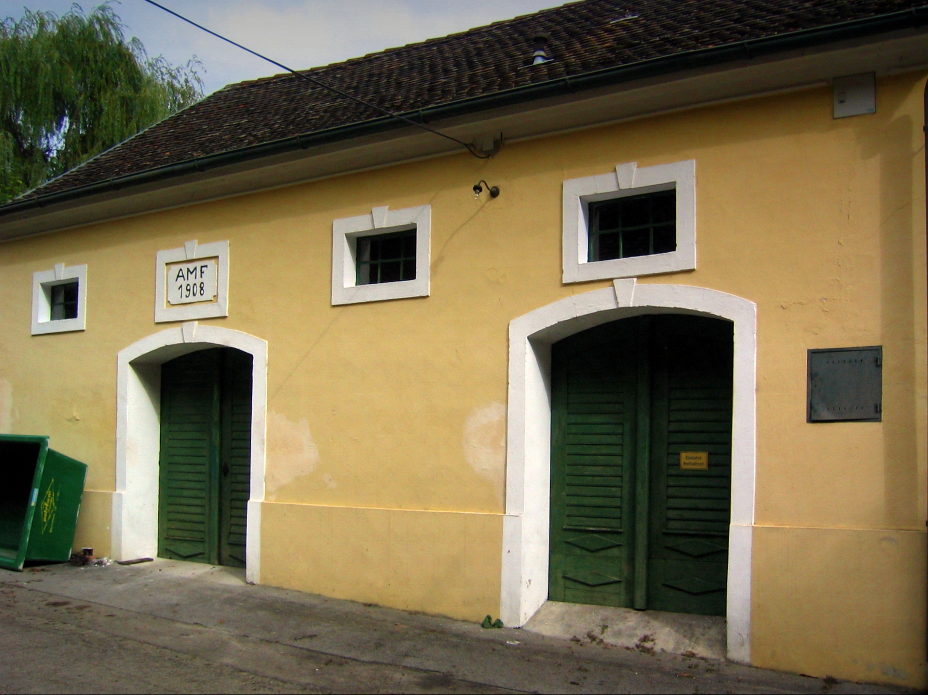 Mühlbergkellergasse Objekt 18